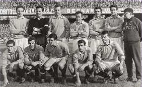 Formazione del Napoli nel campionato 1960/1961.